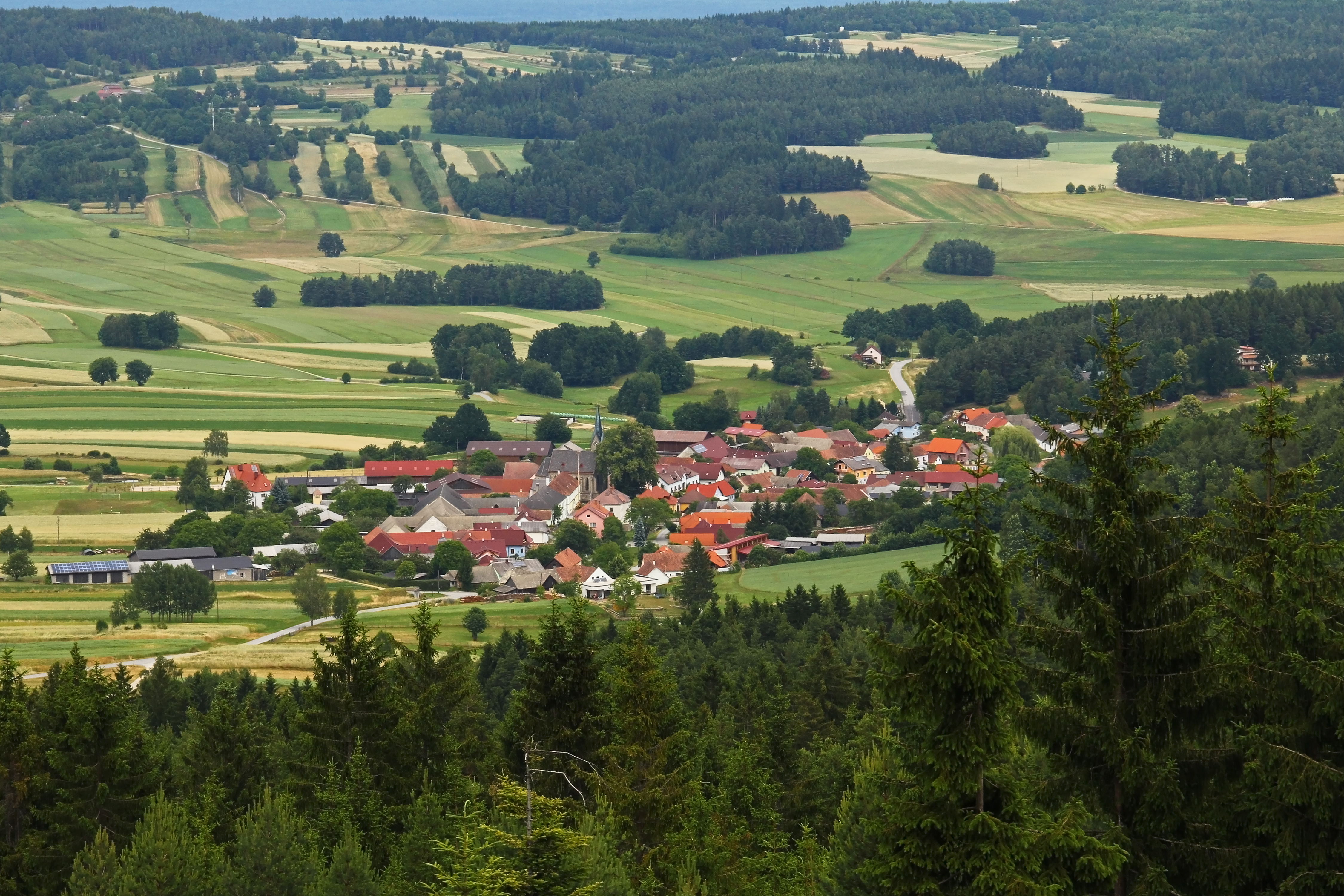 Blick vom Schinderberg auf Heinrichs - Erlebnisweg in Heinrichs bei Weitra